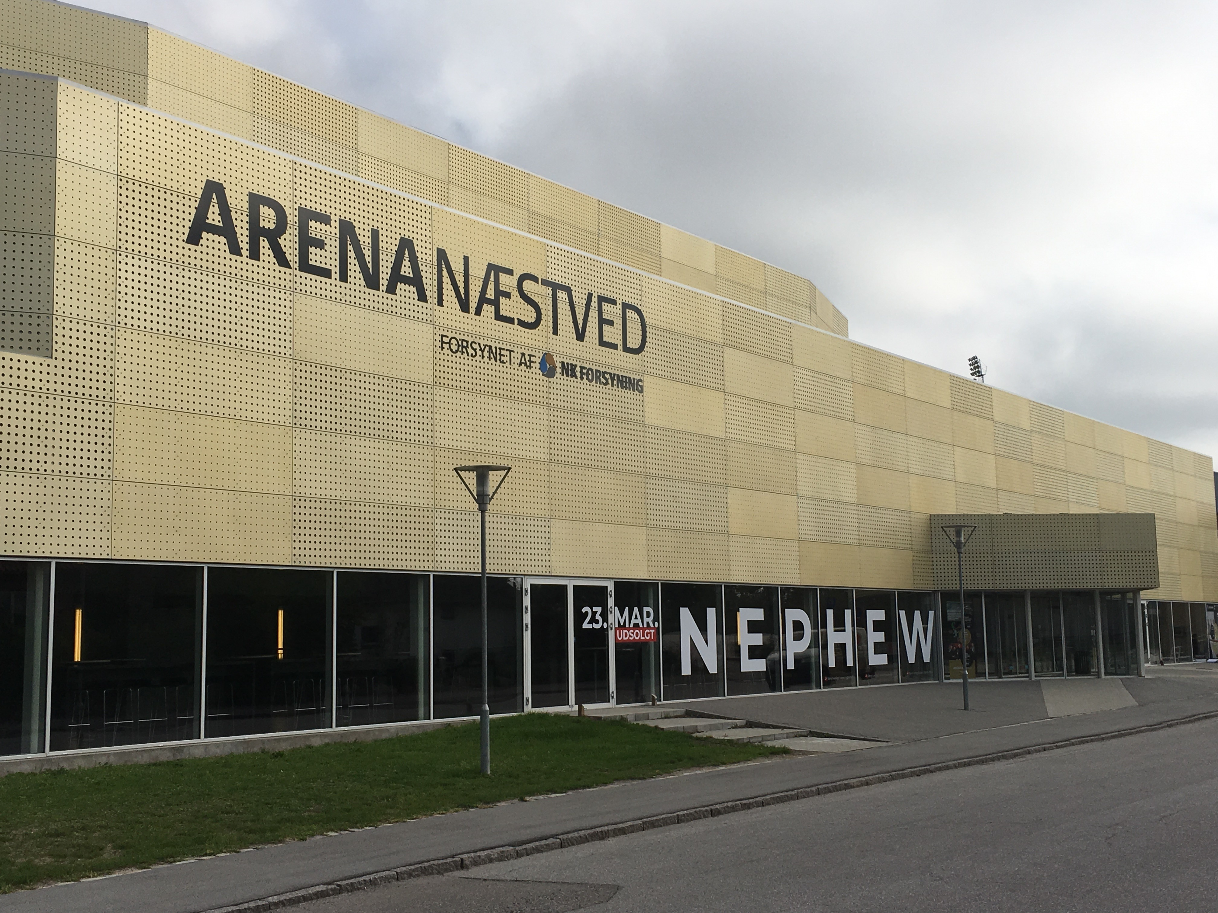 udsnit af Arena Næstveds facade